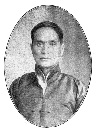 中華民國國會議員